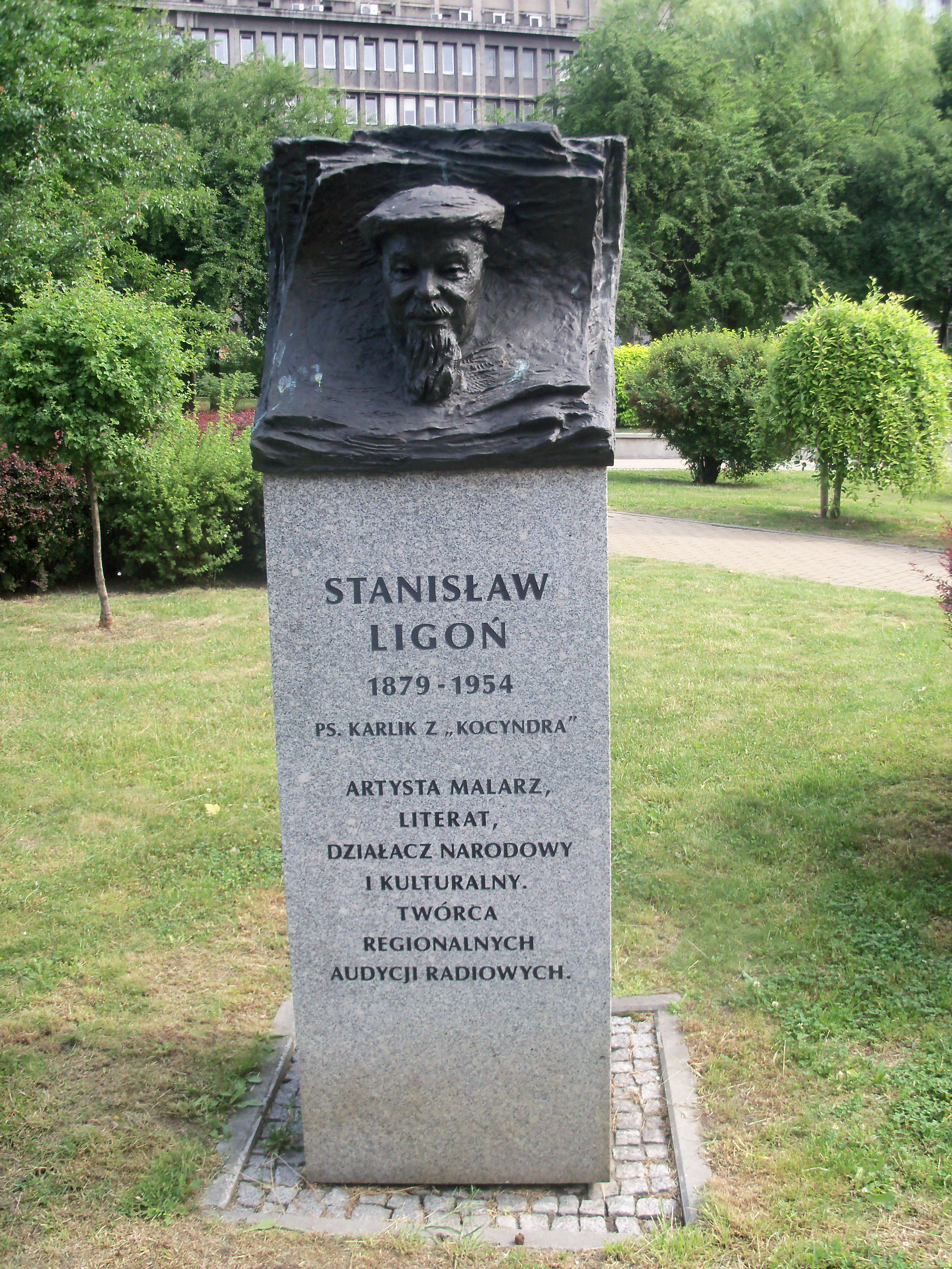 Galeria Artystyczna na placu Grunwaldzkim w Katowicach: Rzeźba przedstawiająca Stanisława Ligonia